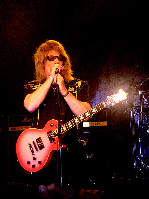 Det här är en manipulerad bild gitarristen Jay Jay French. Den togs under Twisted Sisters spelning i Solnahallen.